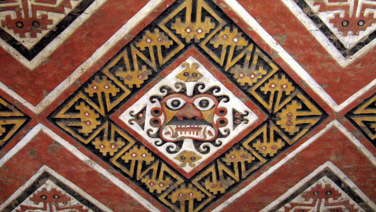 Dios "Aiapæc" o "Degollador", en la "Huaca de la Luna", cerca aTrujillo (Peru)